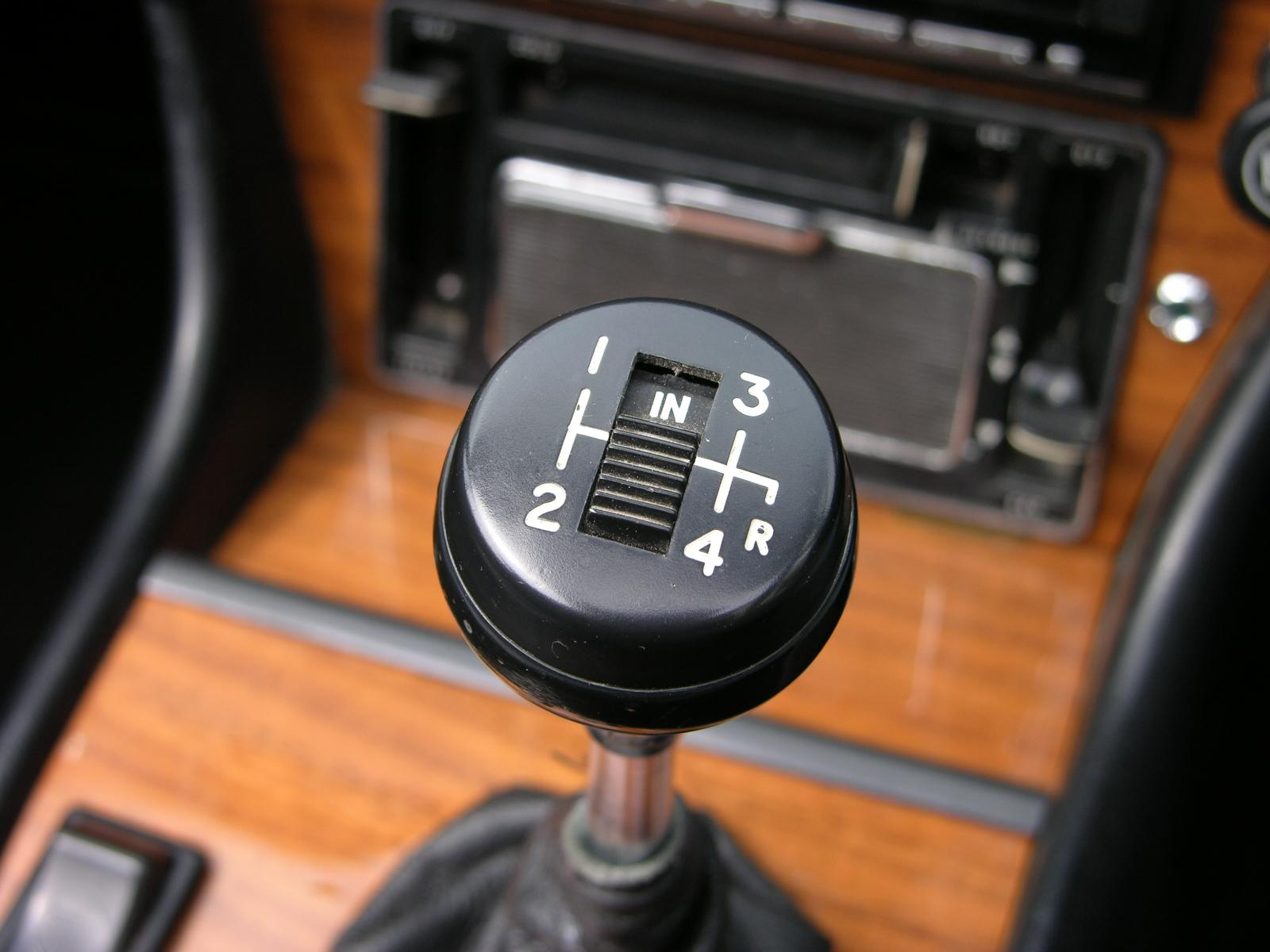 1974 Triumph Stag